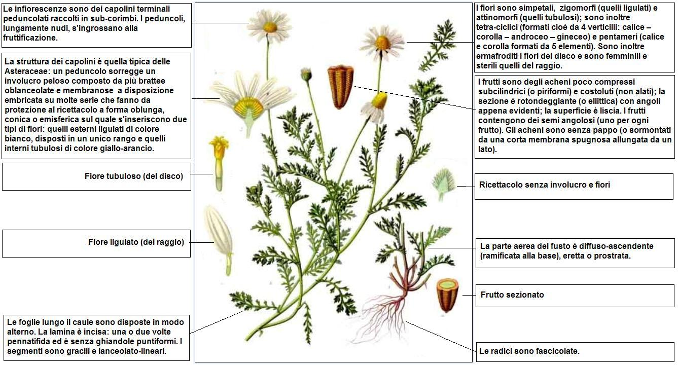 Anthemis arvensis Koeh DESC